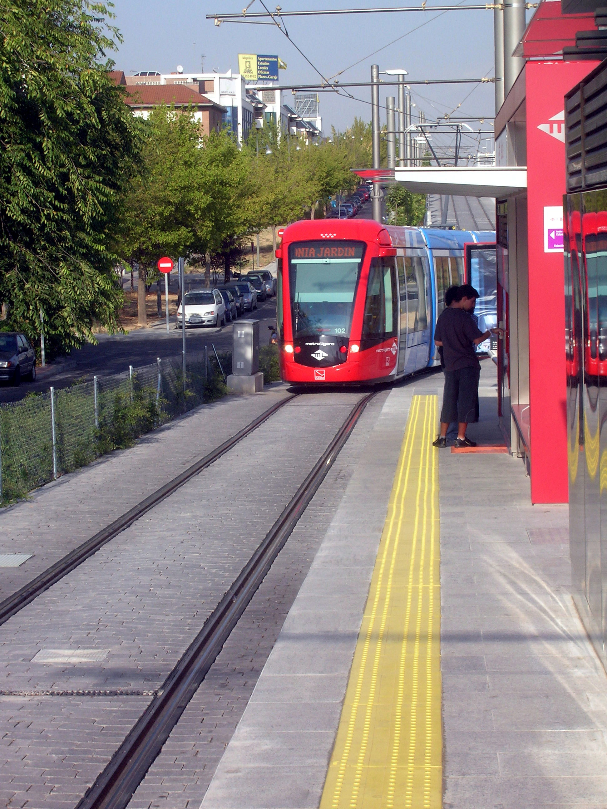 Metro Ligero Linea 2 estación Bélgica / Bélgica station